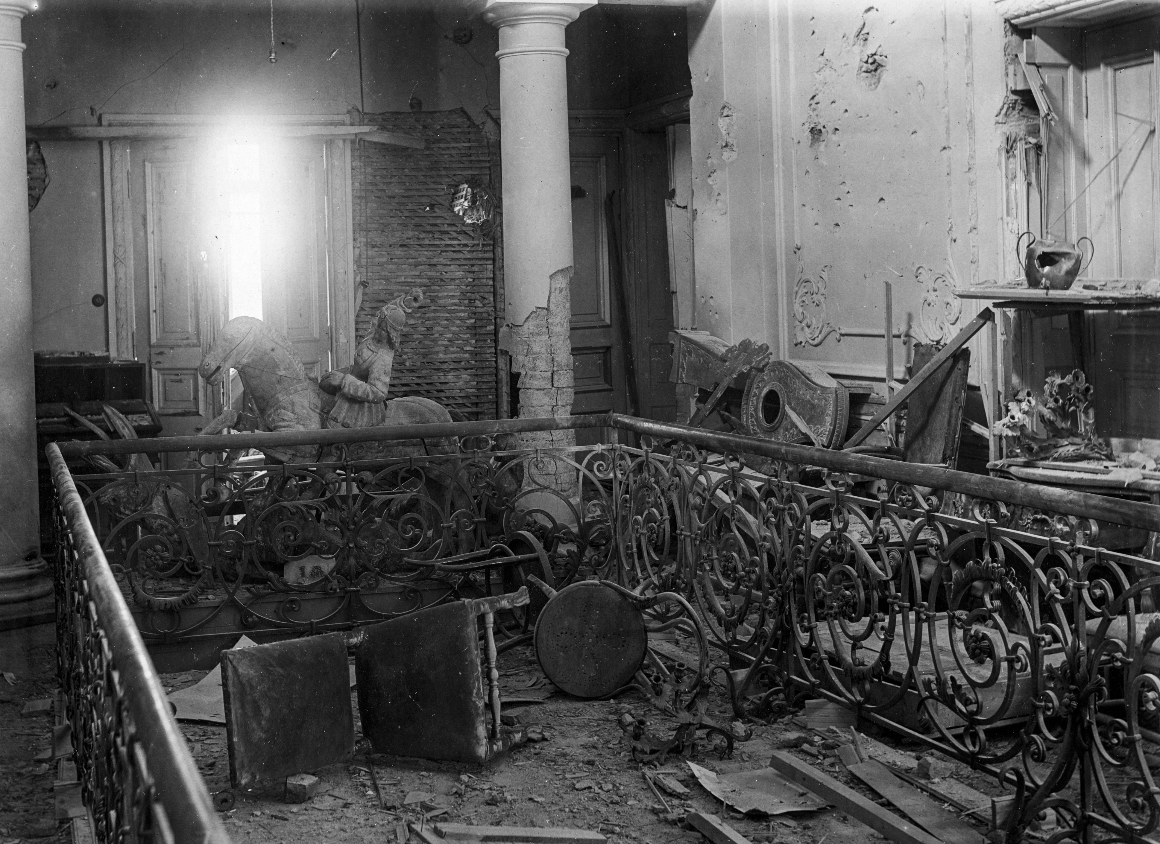 CC-BY Tampere 1918, kuvaaja Martta Terävä, Vapriikin kuva-arkisto. Finnish Civil War 1918, Photographer Martta Terävä, Vapriikki Photo Archives.